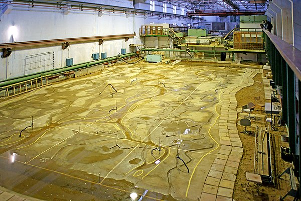 Русловая площадка для моделирования участков рек